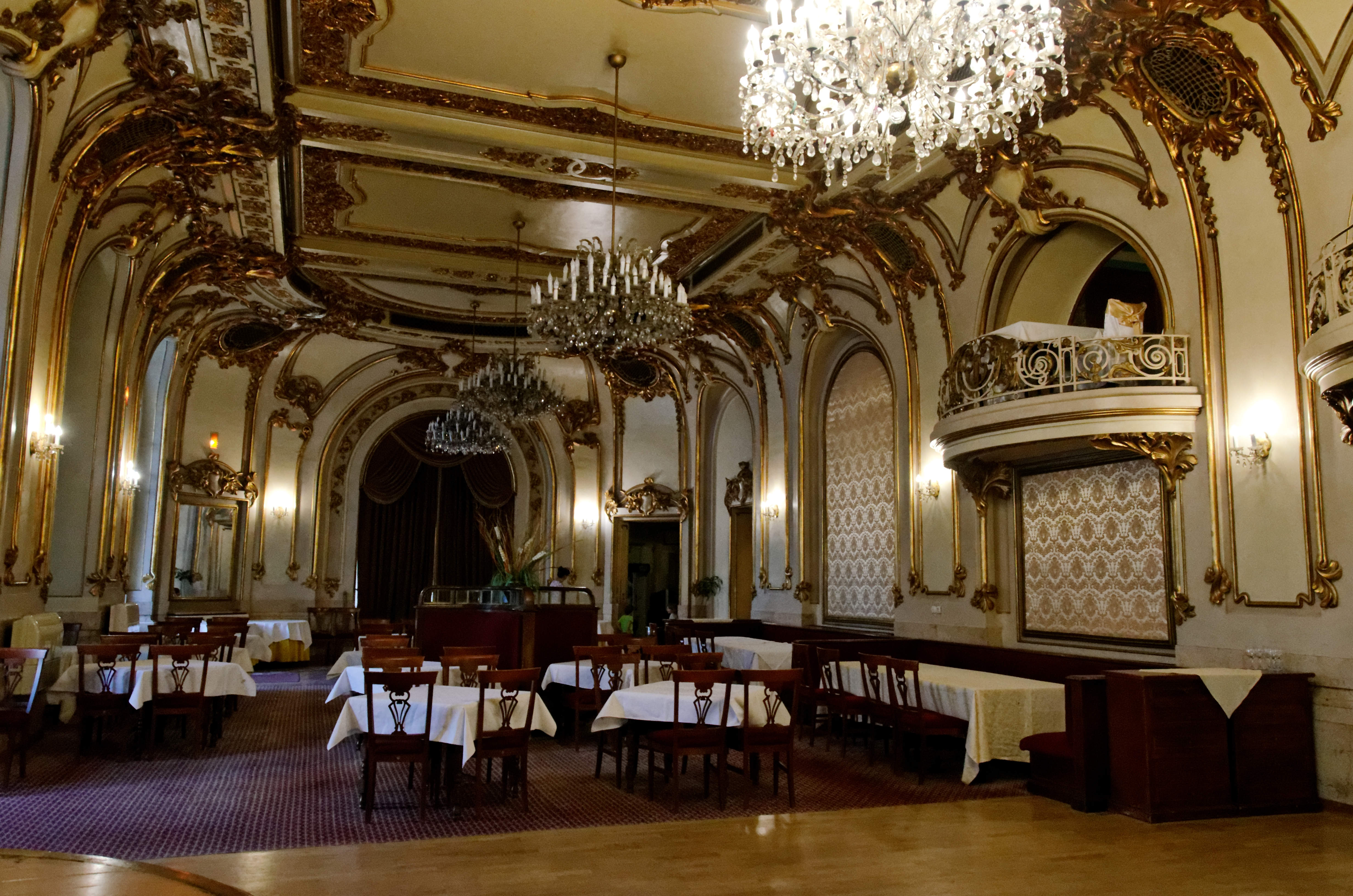 Grande salle de restaurant (rdc) du Cercle militaire national à Bucarest. Str. Constantin Mille 1.